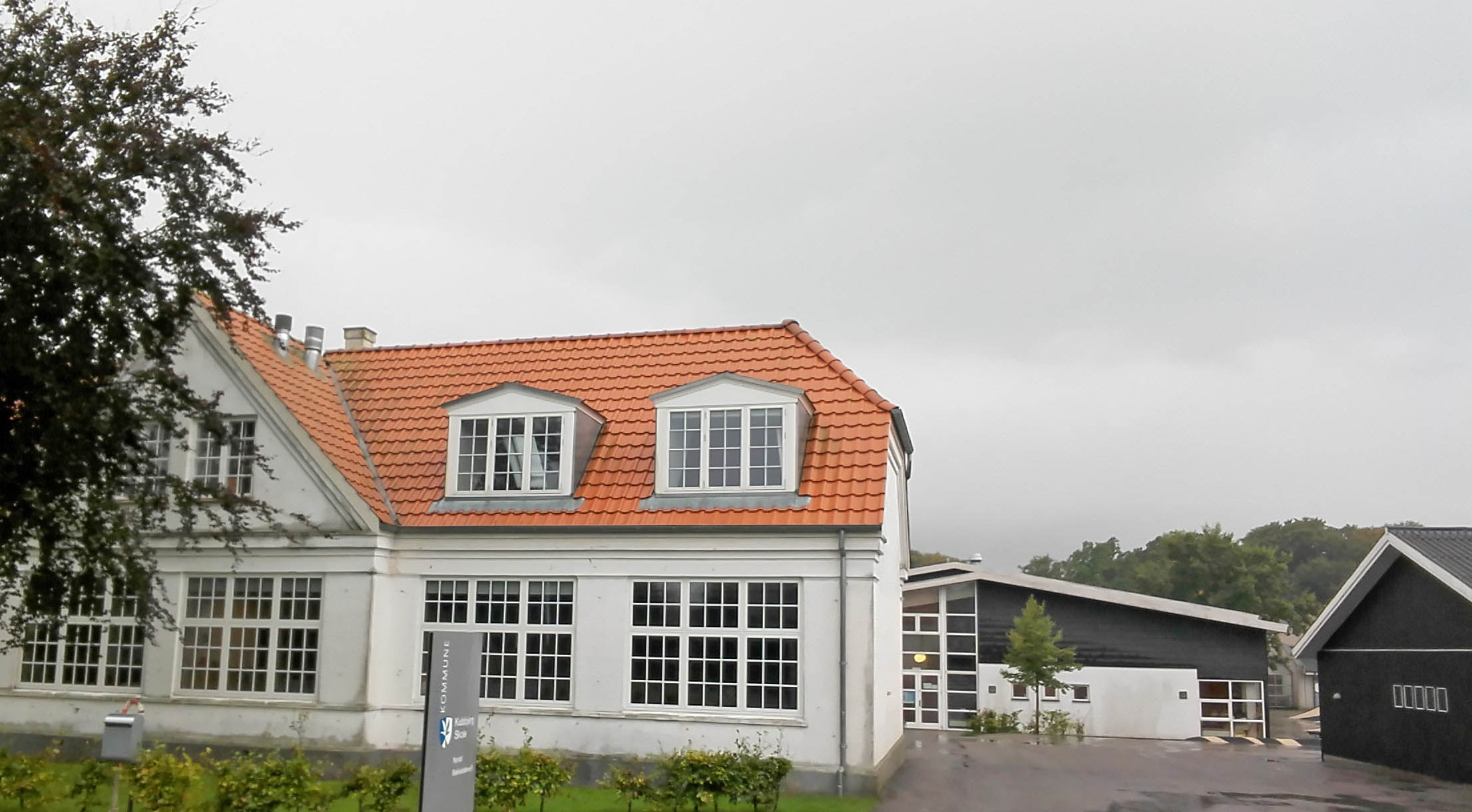 Facaden på Kulsbjerg Skole i Nyråd